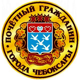 Нагрудный знак «Почётный гражданин города Чебоксары» (для повседневного ношения). Знак светло-бронзового цвета диаметром 21 мм. В центре знака располагается оригинальный герб города Чебоксары на темно-красном фоне размером 13,8х13,9 мм. По краю знака идет кант толщиной 0,3 мм и диаметром 20,4 мм того же темно-красного цвета. Надпись «ПОЧЁТНЫЙ ГРАЖДАНИН ГОРОДА ЧЕБОКСАРЫ» темно-красного цвета располагается по кругу, внешний диаметр 18,3 мм, высота букв 1,3 мм. Нагрудный знак «Почетный гражданин города Чебоксары» изготавливается в технике печати на металле. Основание знака имеет слегка выпуклую форму, края загнуты внутрь, знак имеет булавочное крепление.